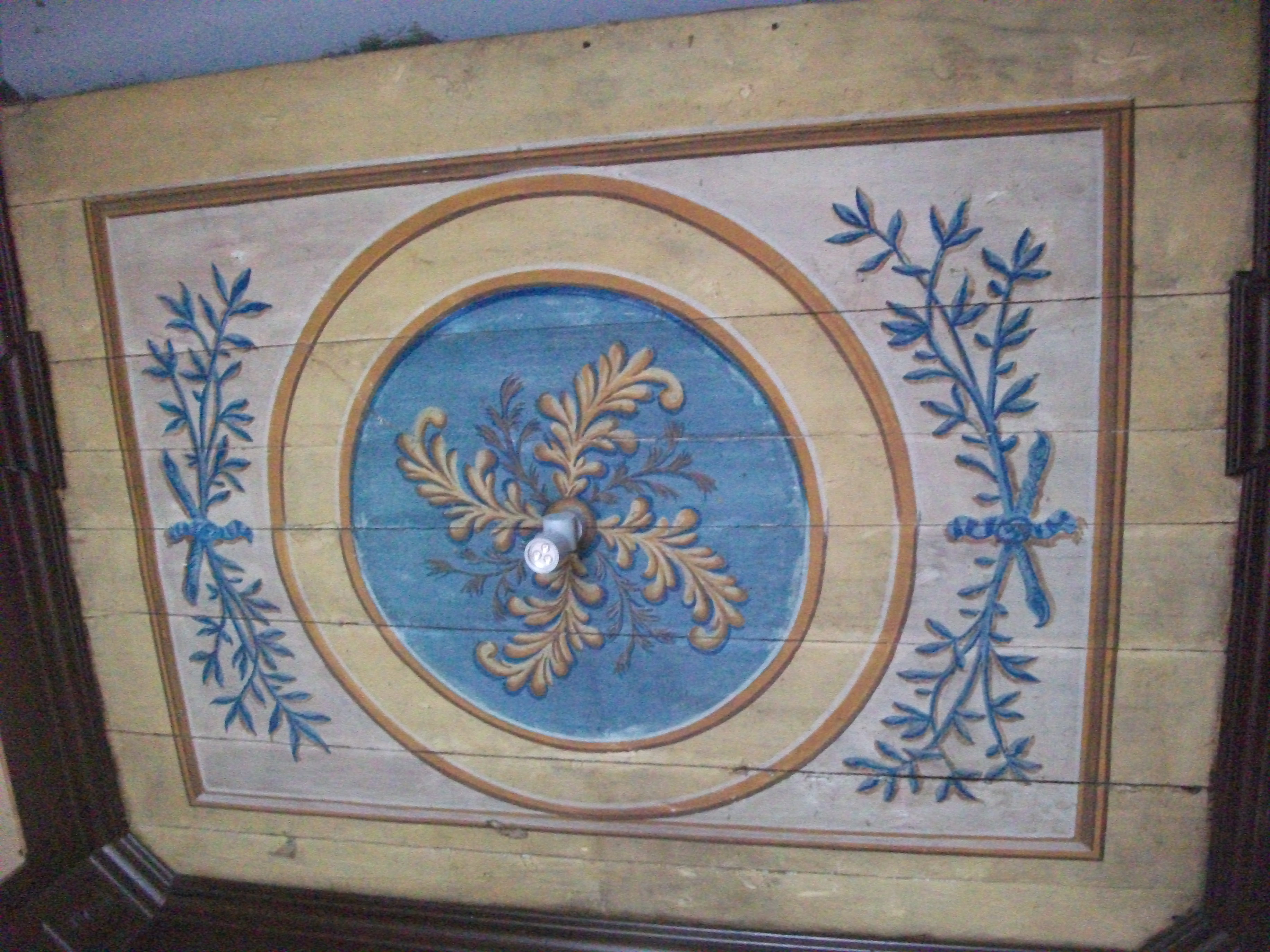 Bussola lignea,chiesa di Barbania